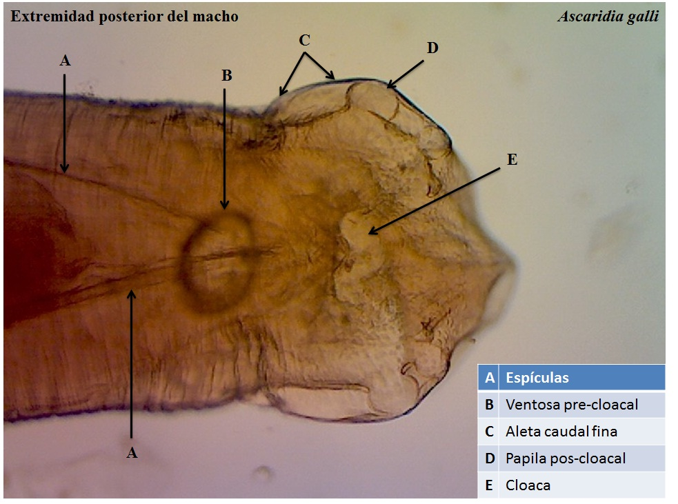 tercio posterior del nematode ascaridia galli macho